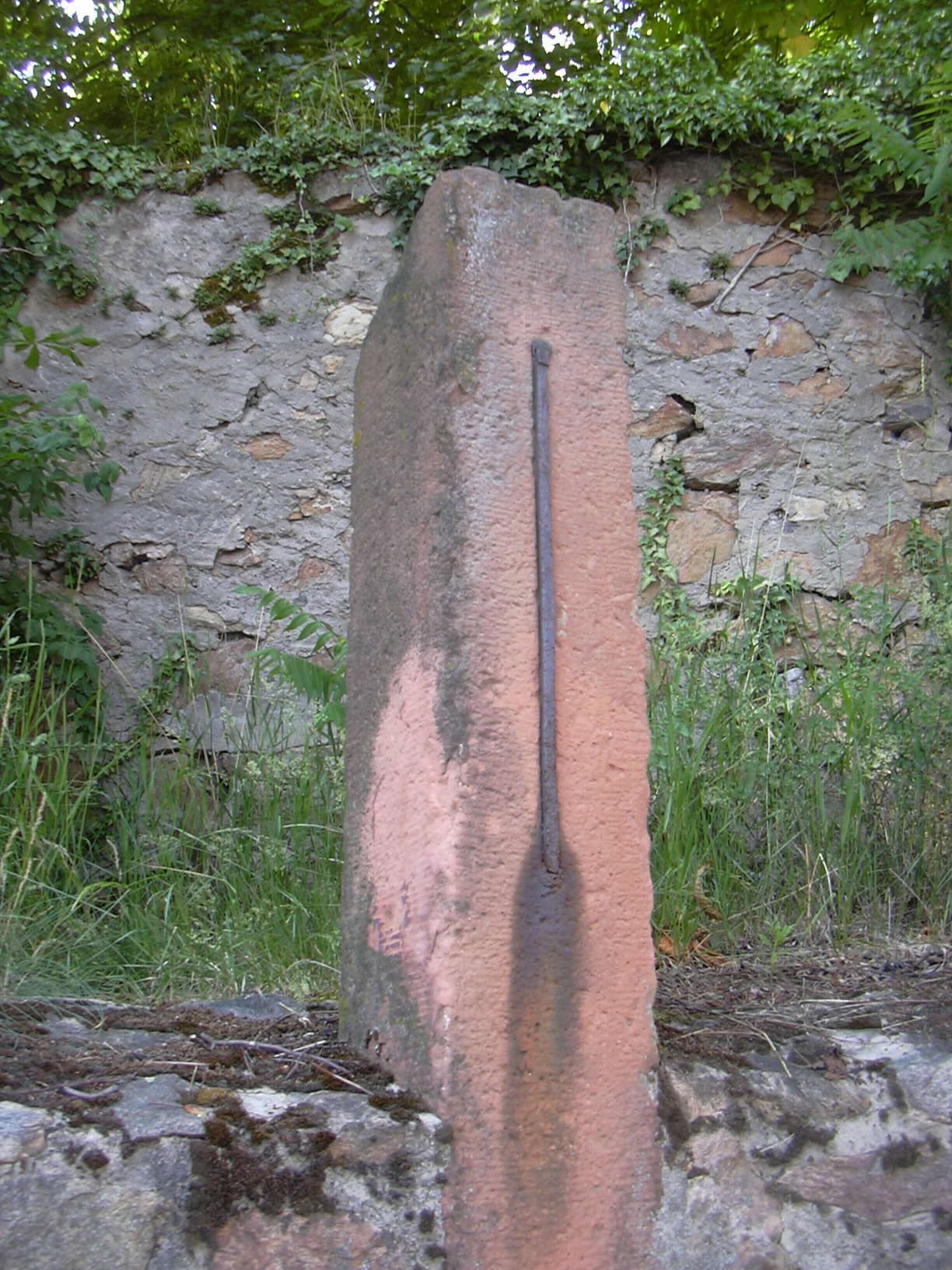 Kälberau "Elle" (local measure), 1763; Alzenau/Kälberau, Bavaria/Germany